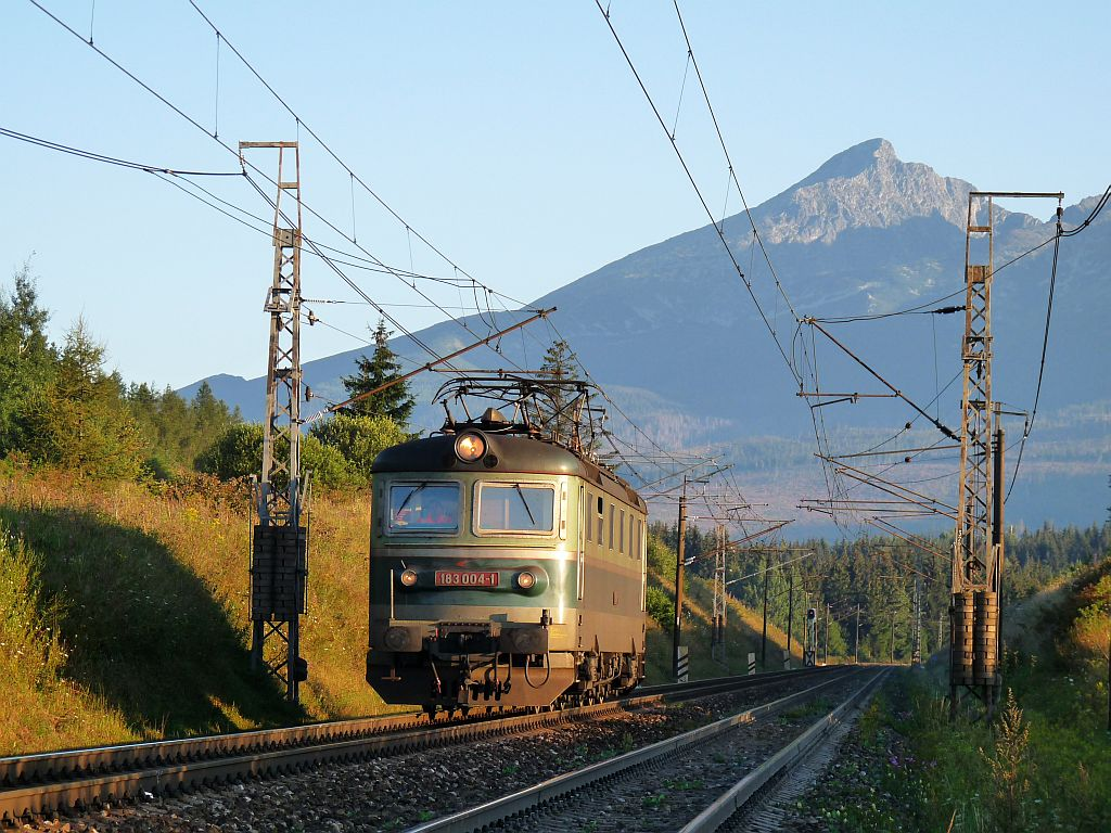 Lokomotiva 183-004